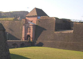 fortification et Porte de Brisach à Belfort (Territoire de Belfort, France) Photo prise en mars 2004 par LP90. Déjà utilisée dans Wikitravel. Copyright : licence GFDL LP90